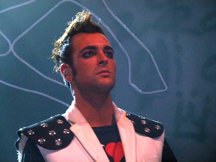 Marco Mengoni in concerto a Milano. Foto scattata durante il concerto tenutosi l'11 settembre a Milano